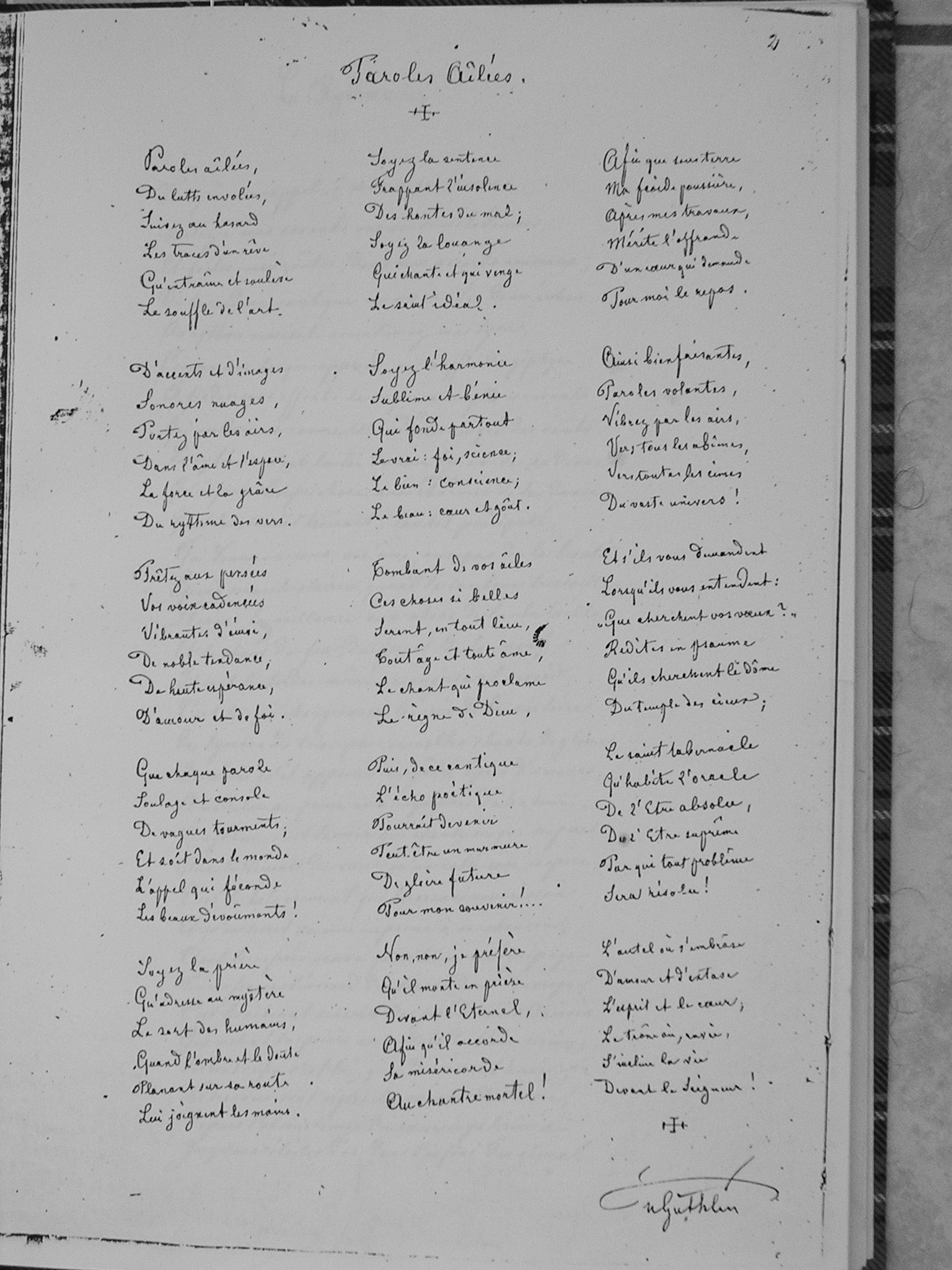 Poème Paroles Ailées issu du recueil réalisé par l'épouse de Philippe Guthlin